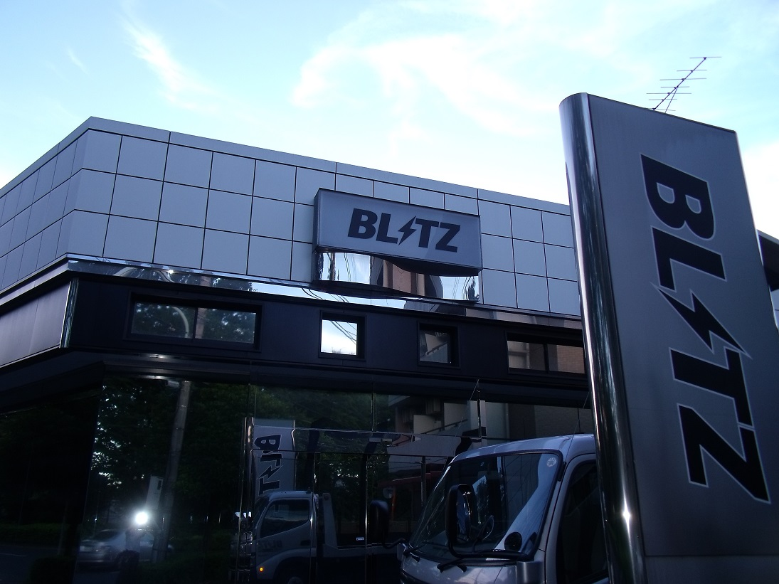 2010年撮影